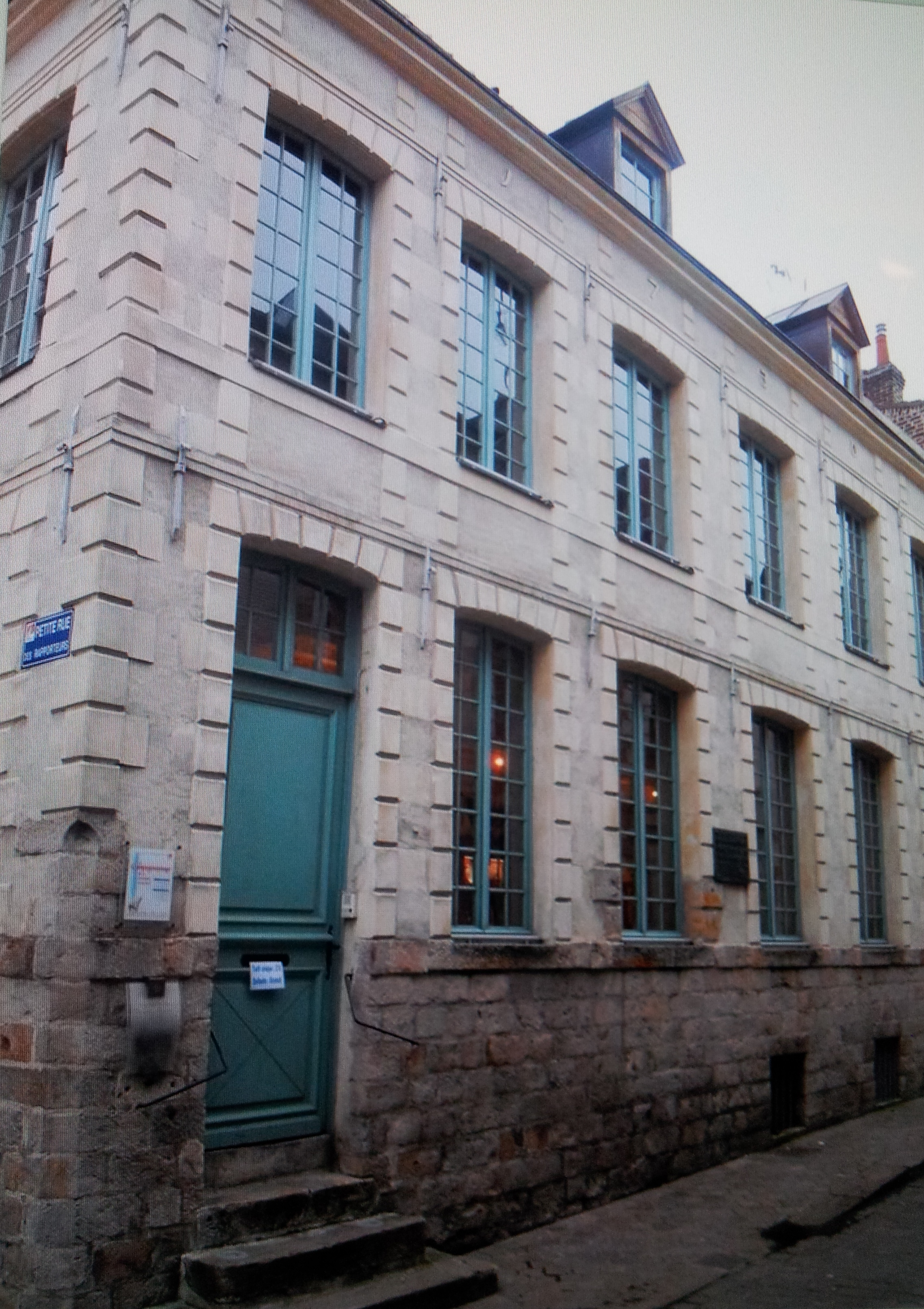 Maison de Maximilien de Robespierre, construite en 1730, située rue Maximilien de Robespierre (ex. rue de la Gouvernance) à Arras (Pas-de-Calais). Il y logeait de 1787 à 1789 avec sa soeur Charlotte et son frère Augustin et c'est là qu'il rédigea les textes prérévolutionnaires qui le firent connaître dans tout l'Artois. Longtemps abandonnée cette maison vient d'être restaurée, devenue aujourd'hui un musée retraçant pour partie la vie de Robespierre et pour l'autre partie l'histoire du compagnonnage.